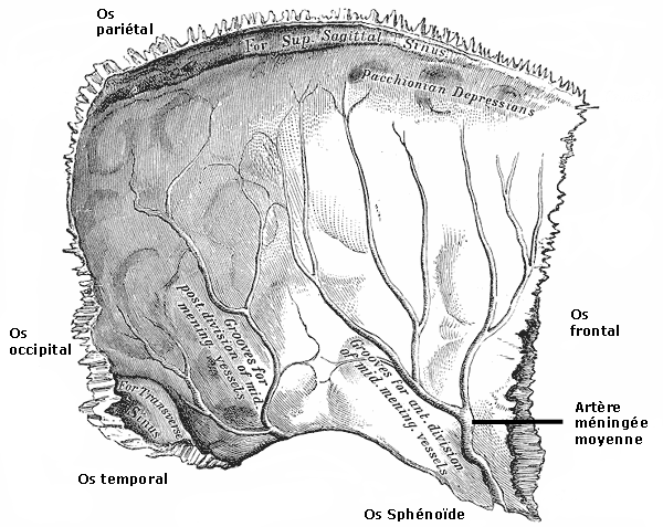 Left parietal bone. Inner surface.